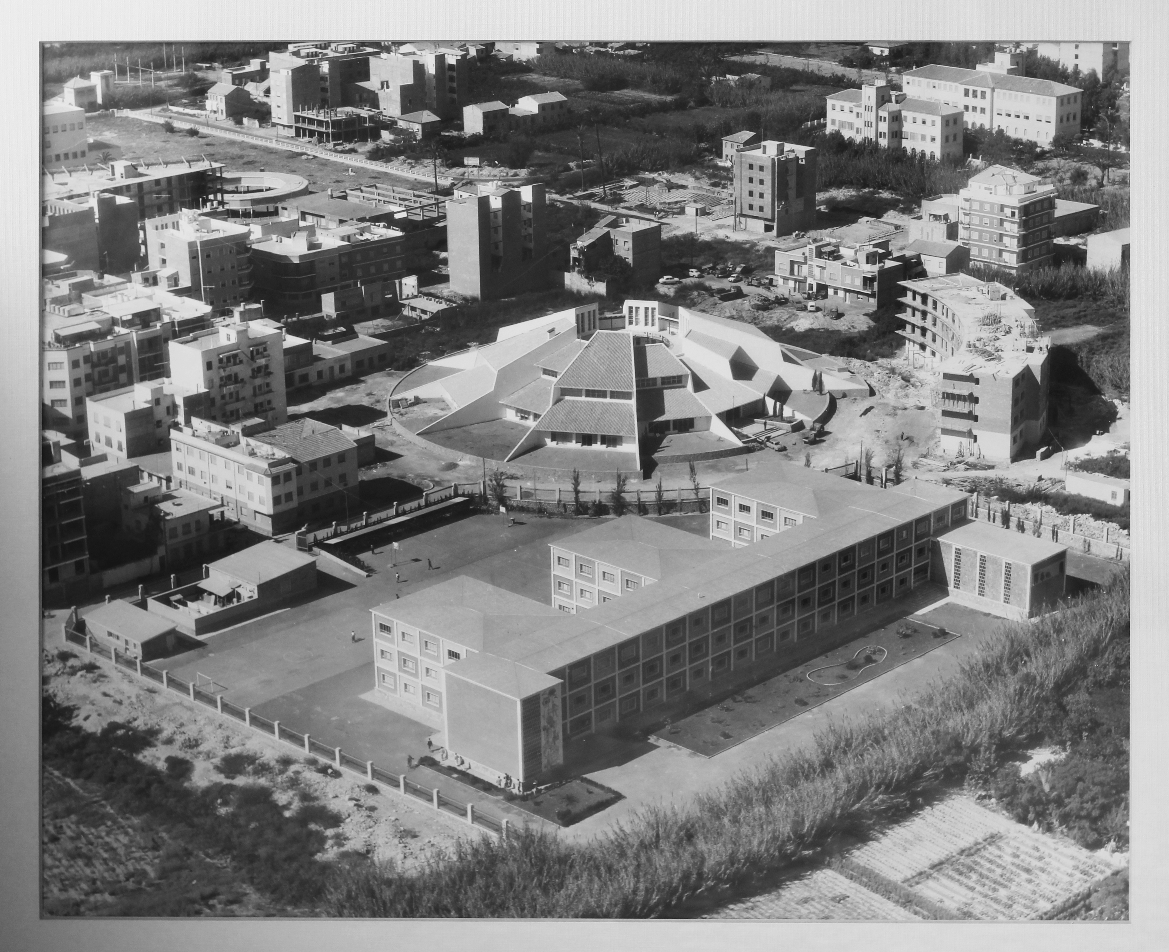 Vista aérea del Instituto de Educación Secundaria Alfonso X el Sabio entre la actuales Avenida Don Juan de Borbón y Escuela de Arte de Murcia, en años recientes de la construcción de ambos edificios.